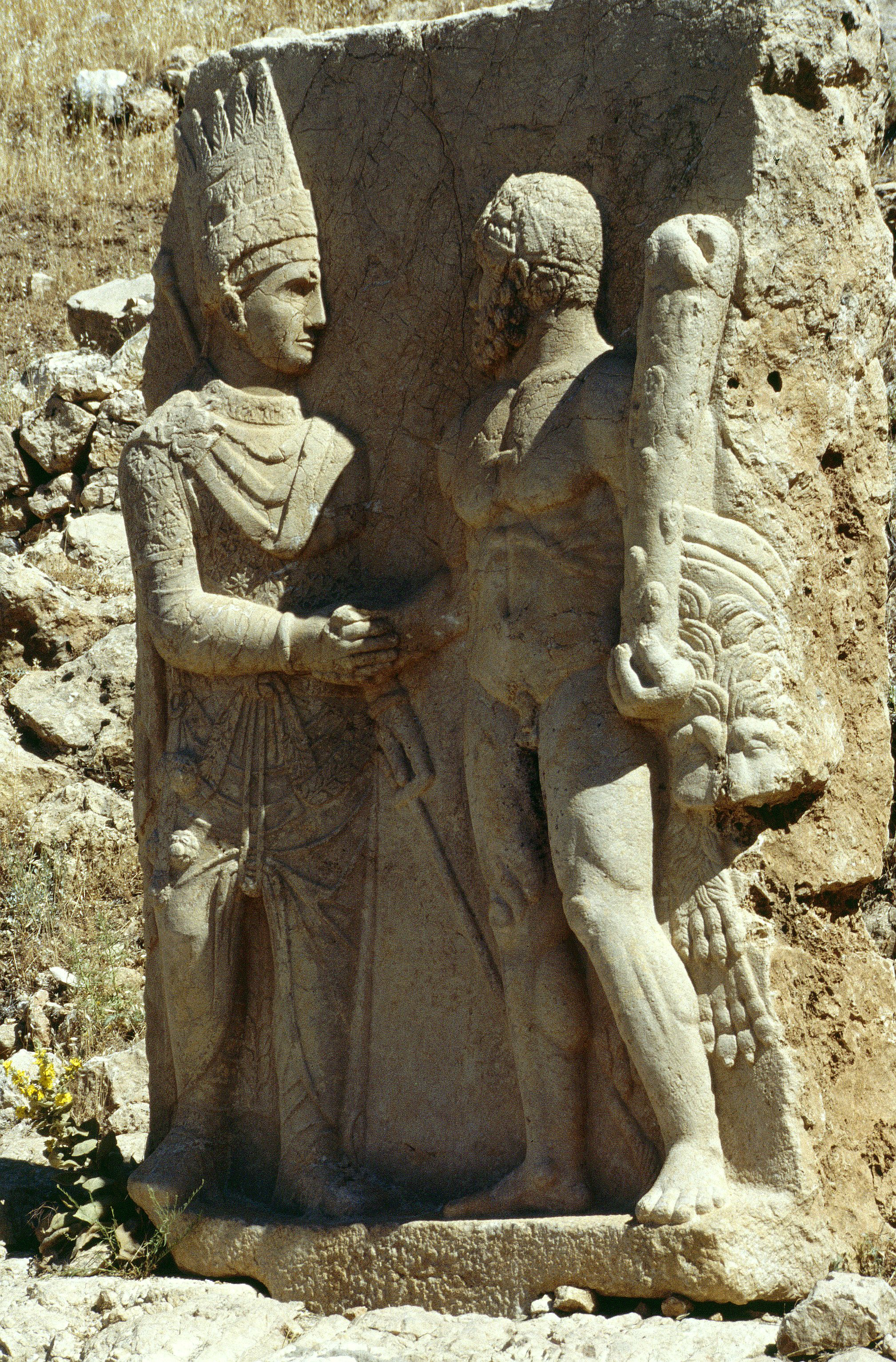 Arsameia/Nymphaios Sockelanlage III, Dexiosis